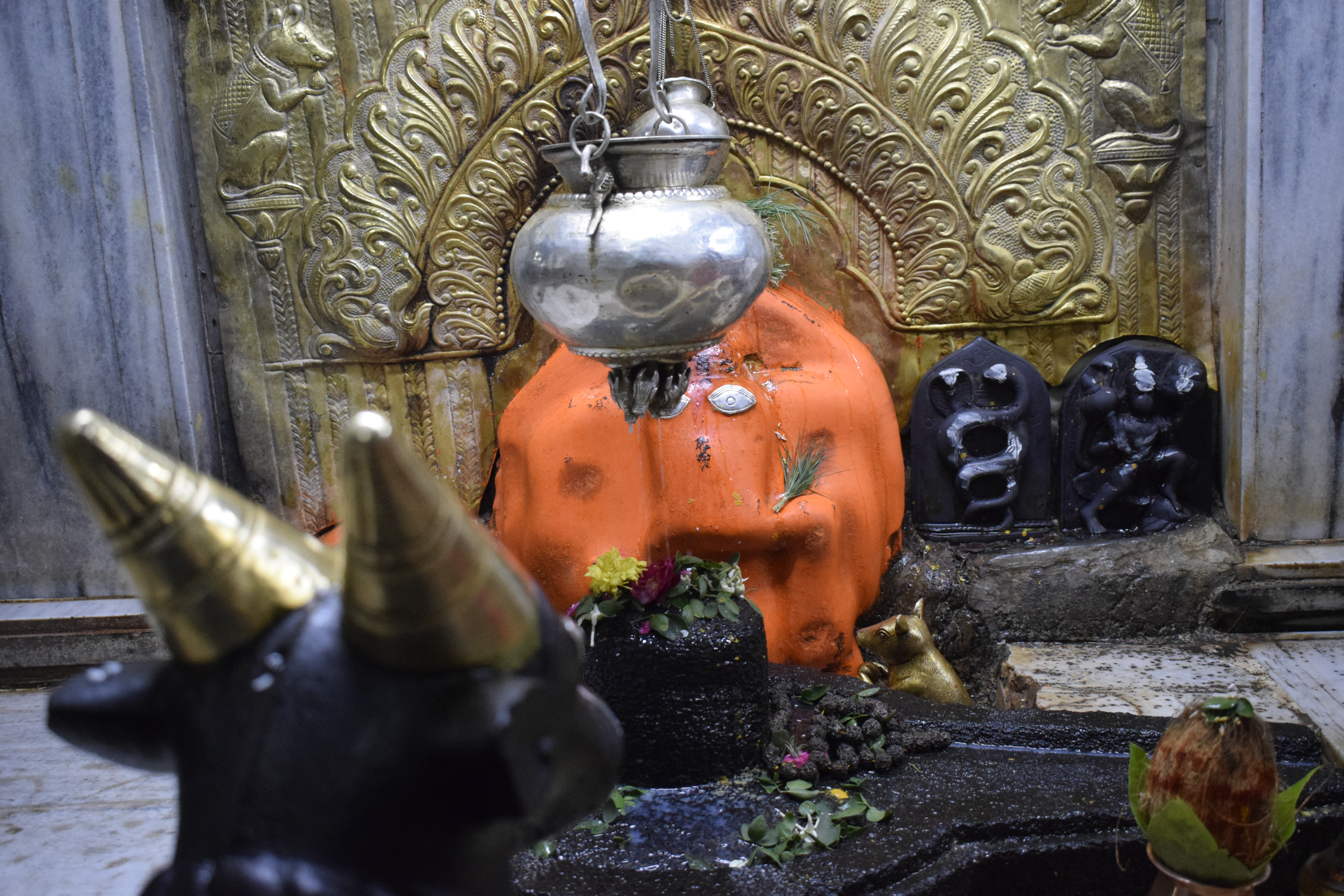 श्री शेळगी गणेश लिंग